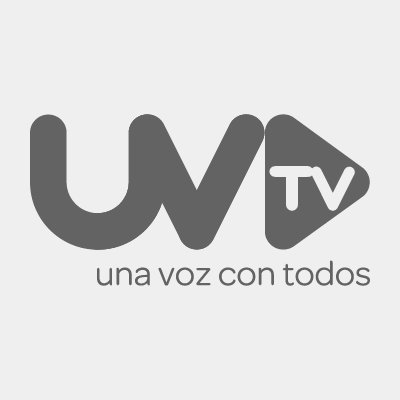 Una Voz Con Todos 2016